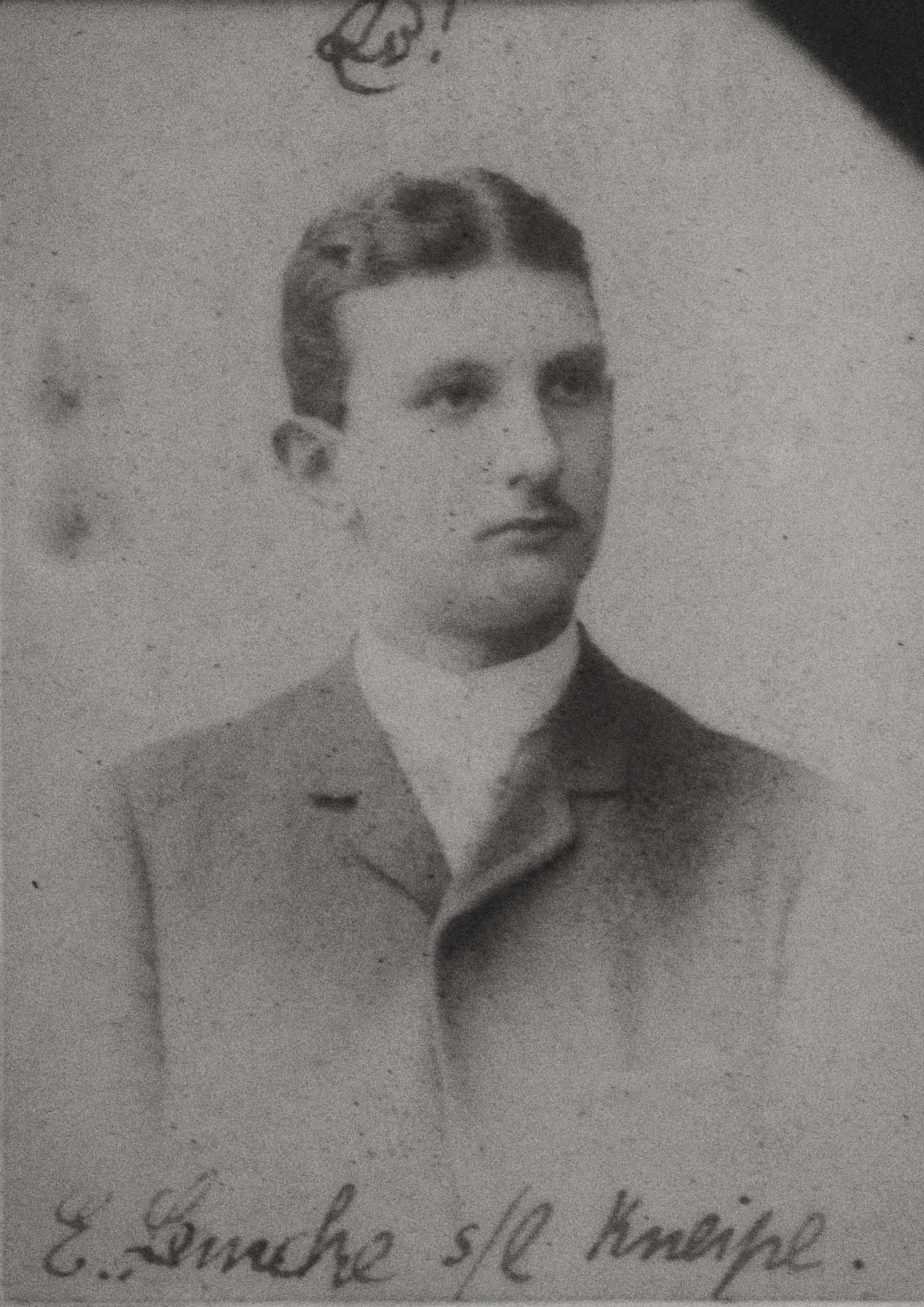 Fotografie von Emil Lemcke als Mitglied der Studentenverbindung Leonensia. Über Lemckes Kopf befindet sich der Zirkel der Verbindung Leonensia. Standort der Fotografie: Ahnengalerie im Conventssaal der Verbindung Leonensia